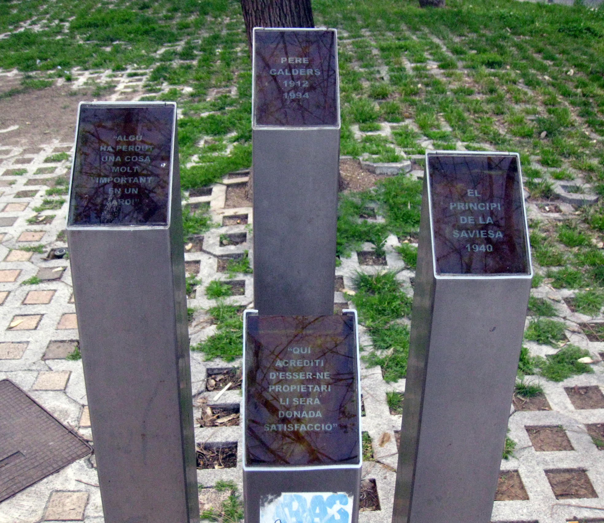 A Pere Calders (Sara Pons). Travessera de Dalt, des del c. d'Escorial fins la ronda del Guinardó, i ronda del Guinardó fins al c. de Sardenya (Barcelona)